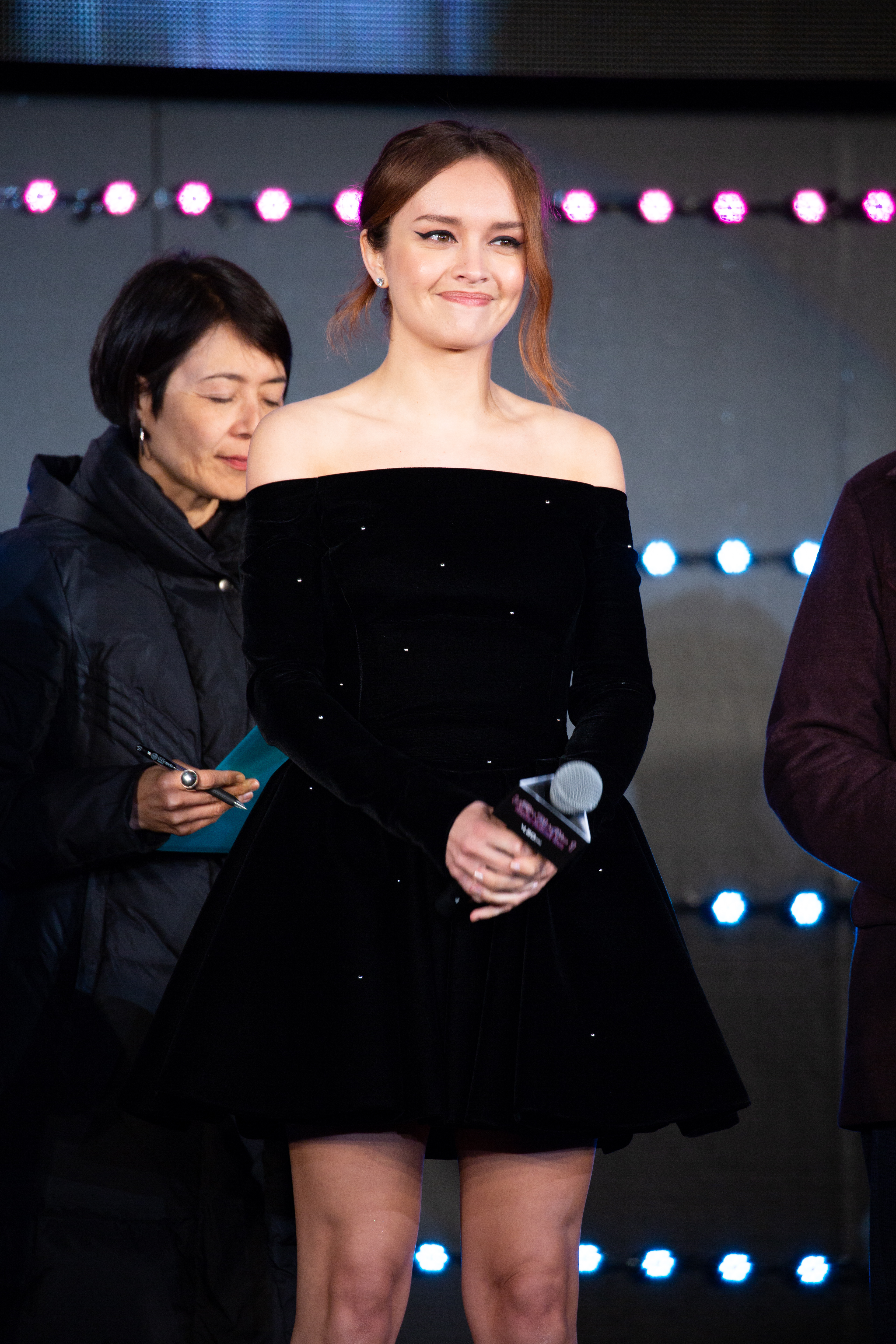 レディ・プレイヤー1 ジャパン・プレミア レッドカーペット オリヴィア・クック